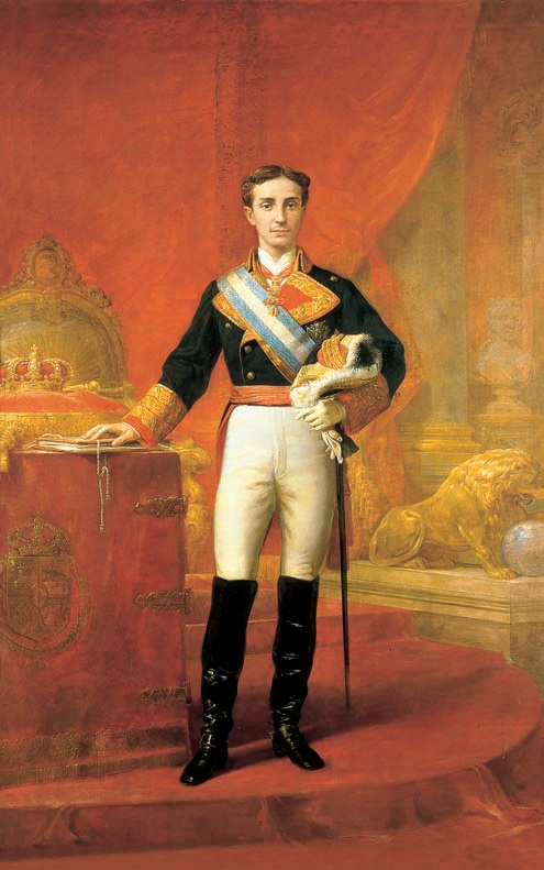 Retrato del rey Alfonso XII (1857-1885), vestido con uniforme de capitán general del ejército español y portando el collar de la Orden del Toisón de Oro, entre otras condecoraciones.